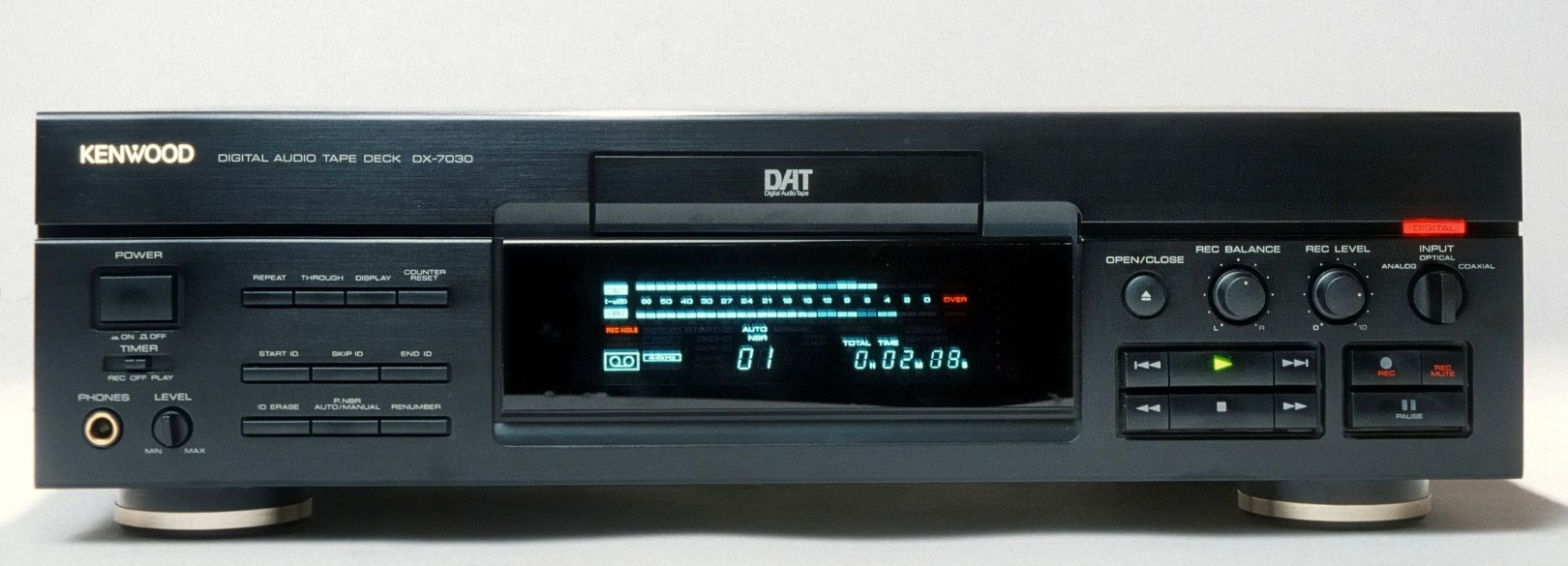 Platine DAT haute fidélité Kenwood